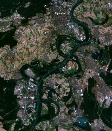 Durch nicht abgeholzte Stromauen auf dem Satellitenbild gut sichtbarer Verlauf des Altrheins zwischen Germersheim und Speyer. Erstellt mit NASA World Wind.